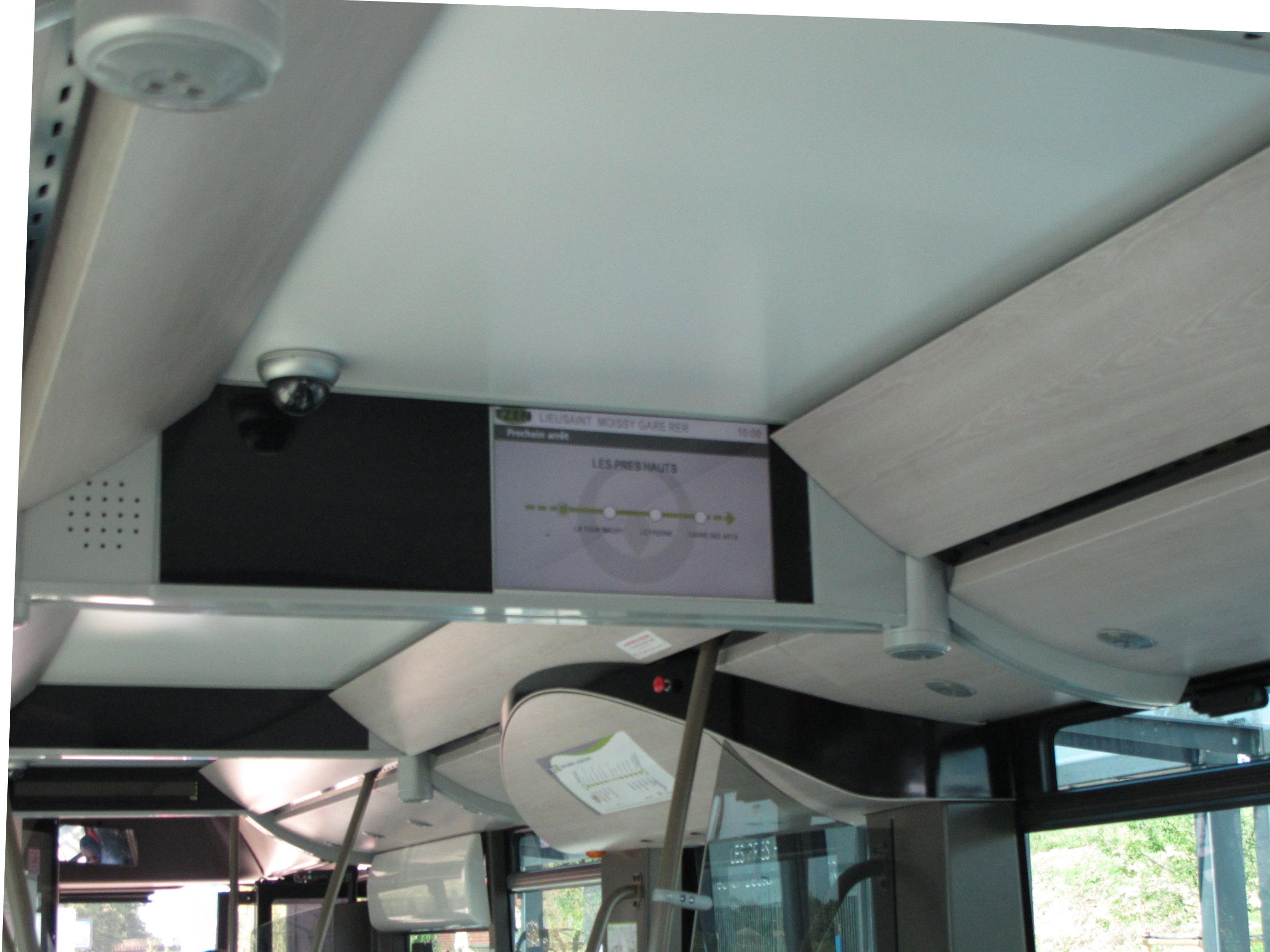 T-Zen ligne 1 - Intérieur des bus Crealis Neo 12 ; entre Corbeil-Essonnes (Essonne) et Lieusaint (Seine-et-Marne), France